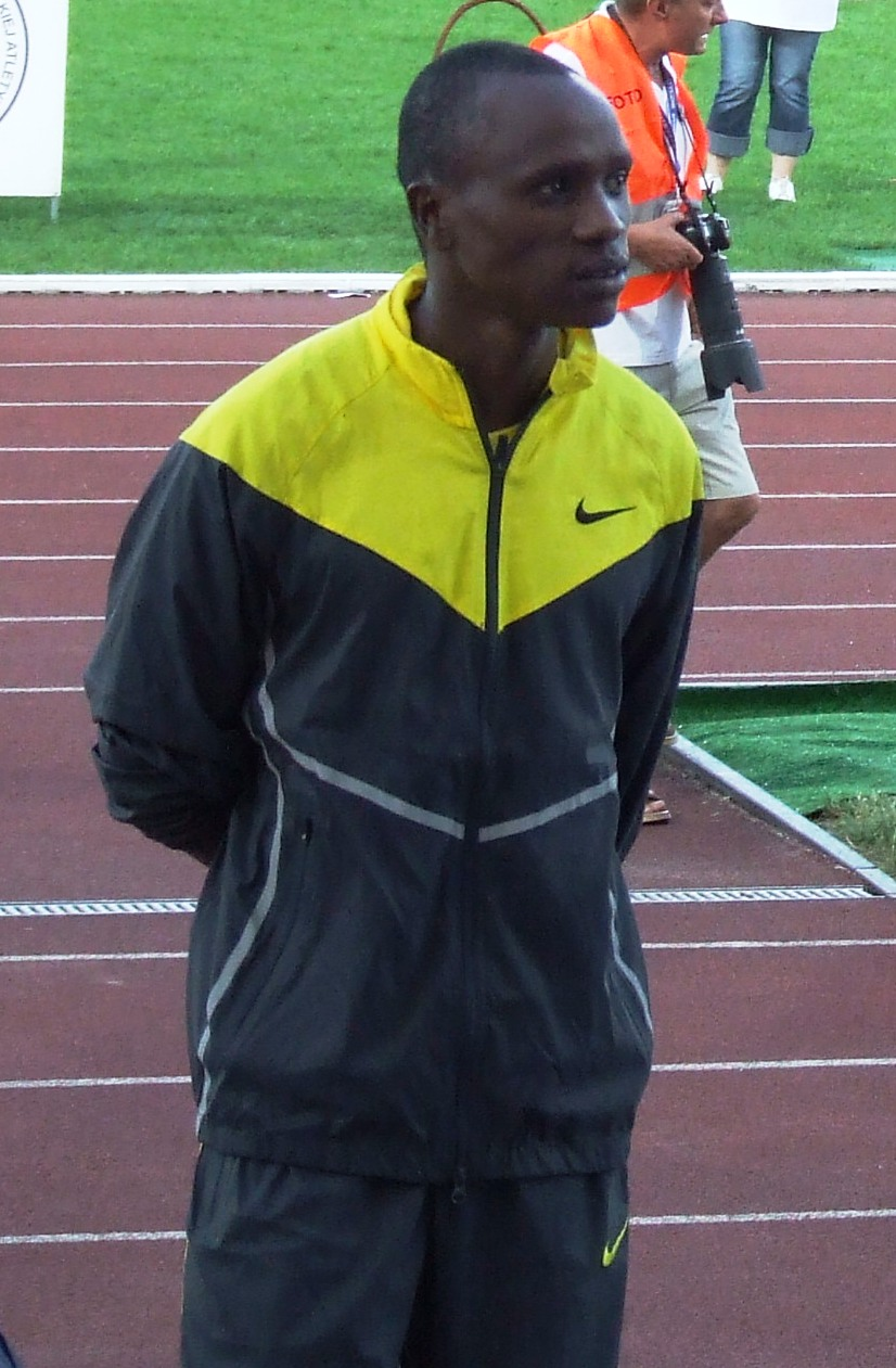 Justus Koech, keniński biegacz (800 m), Bydgoszcz Dolcan Cup 2007